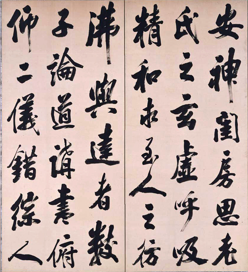 楽志論屏風 市河米庵